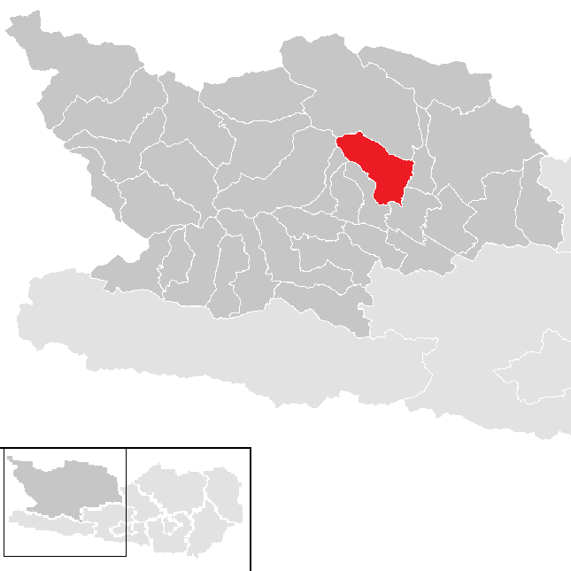 Bezirk Spittal an der Drau